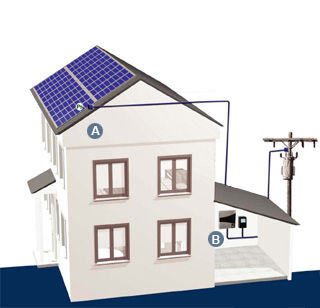 Sistema de autoconsumo energia electrica con conexión a red